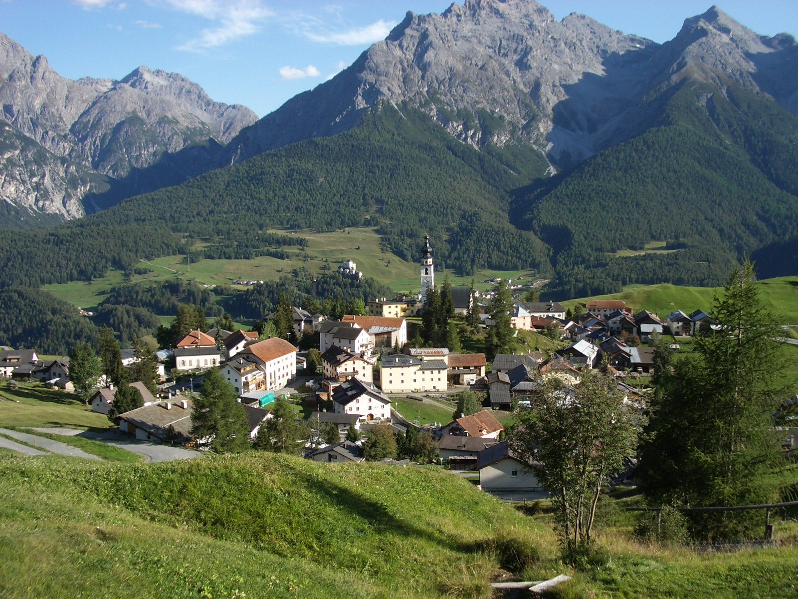 Ftan GR, Switzerland self-made, September 2006